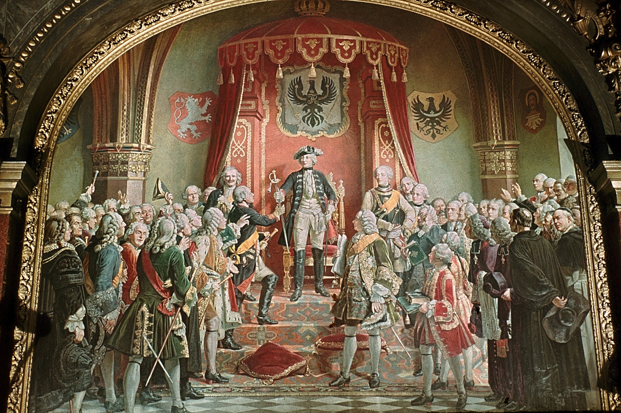 Wandgemälde für die ehemalige Ruhmeshalle Berlin.